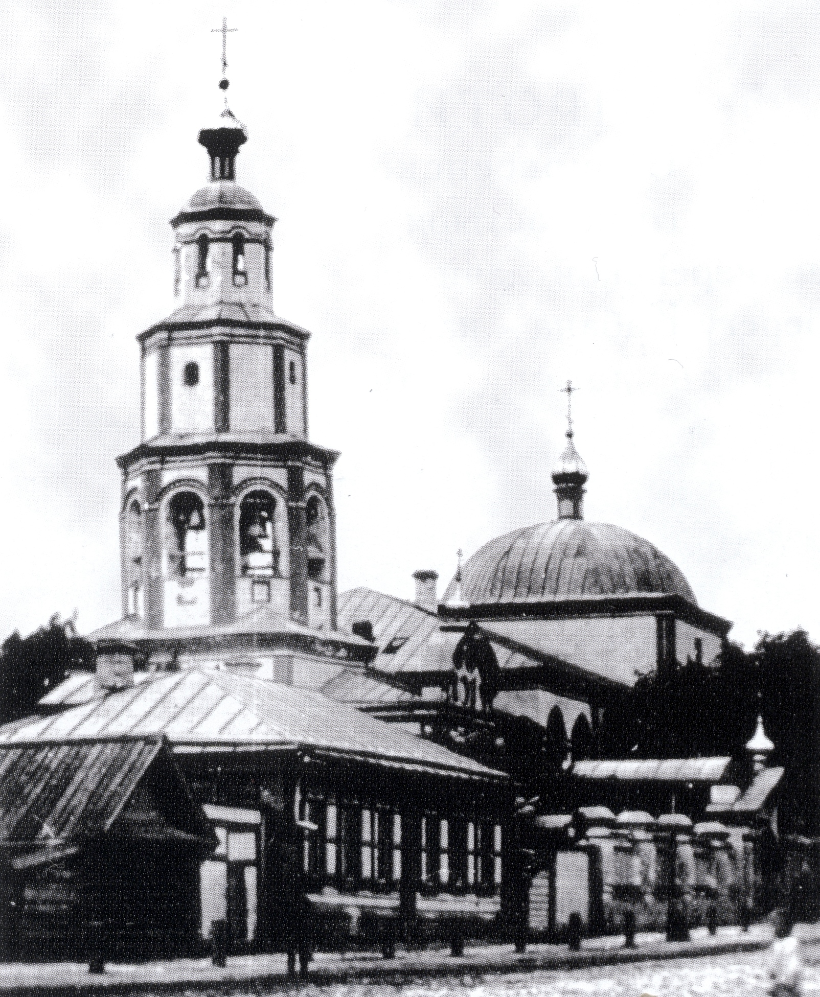 Церковь Сошествия Святого Духа в Суконной слободе города Казани.